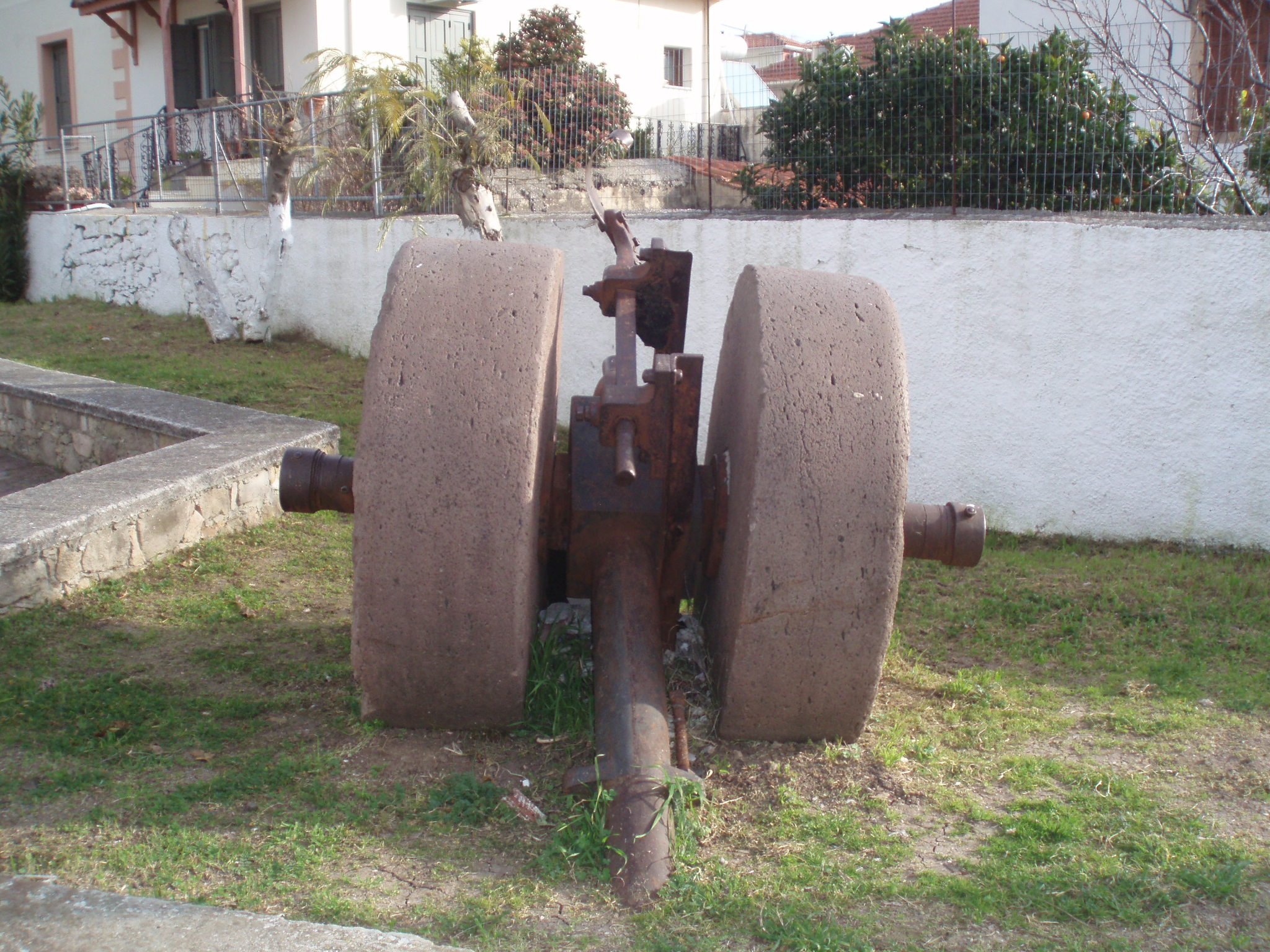 Οι μυλόπετρες από το παλιό ελαιοτριβείο στον Πολιχνίτο εκτίθενται στην μικρή πλατεία απέναντι από το παλιό ελαιοτριβείο, το σημερινό Πολύκεντρο του Πολιχνίτου.